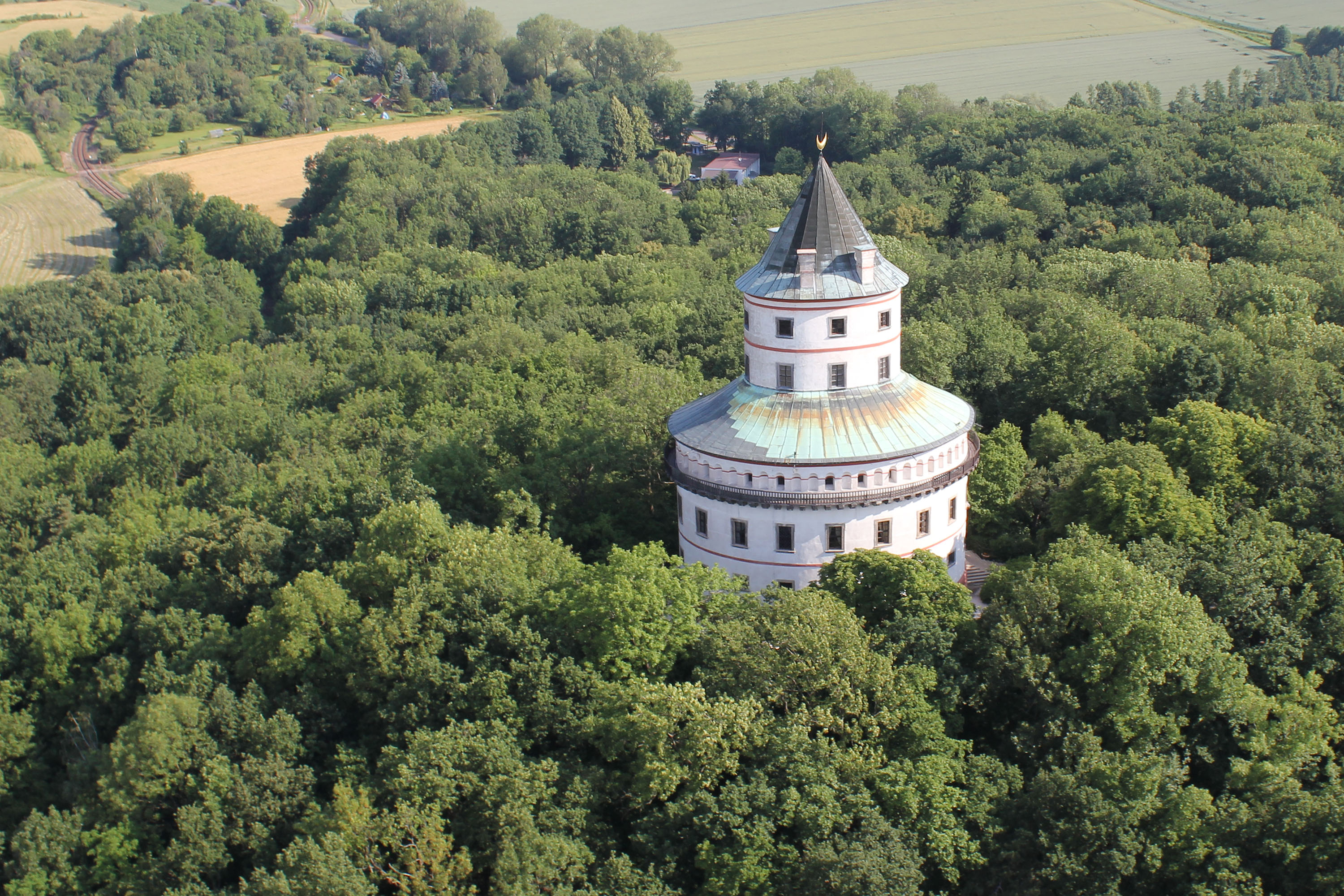 Zámek Humprecht Sobotka, Březno 363, Sobotka